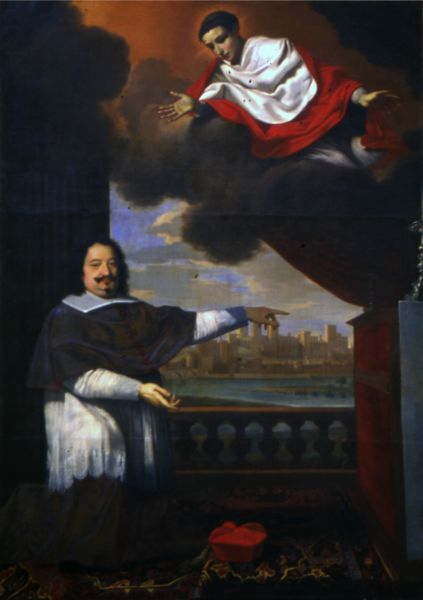 Le Vice-légat Frédéric Sforza place la ville d'Avignon sous la protection de saint Pierre de Luxembourg. Collection de la ville d'Avignon, entrée au musée en 1839.